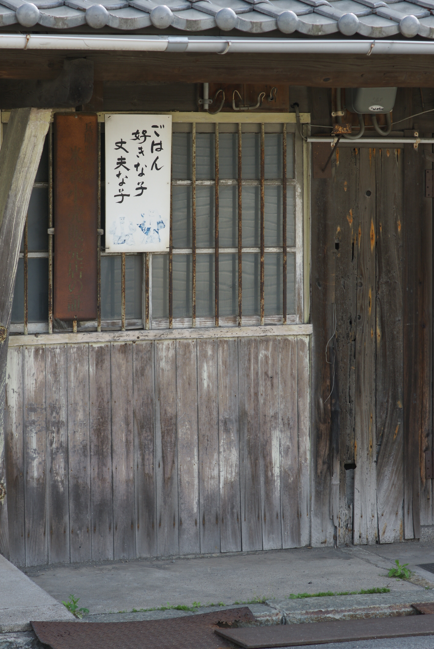 高砂市高砂町あたり?